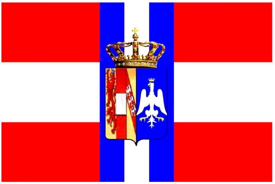 Bandiera Ducato di Modena Lavoro Personale 27/01/2007